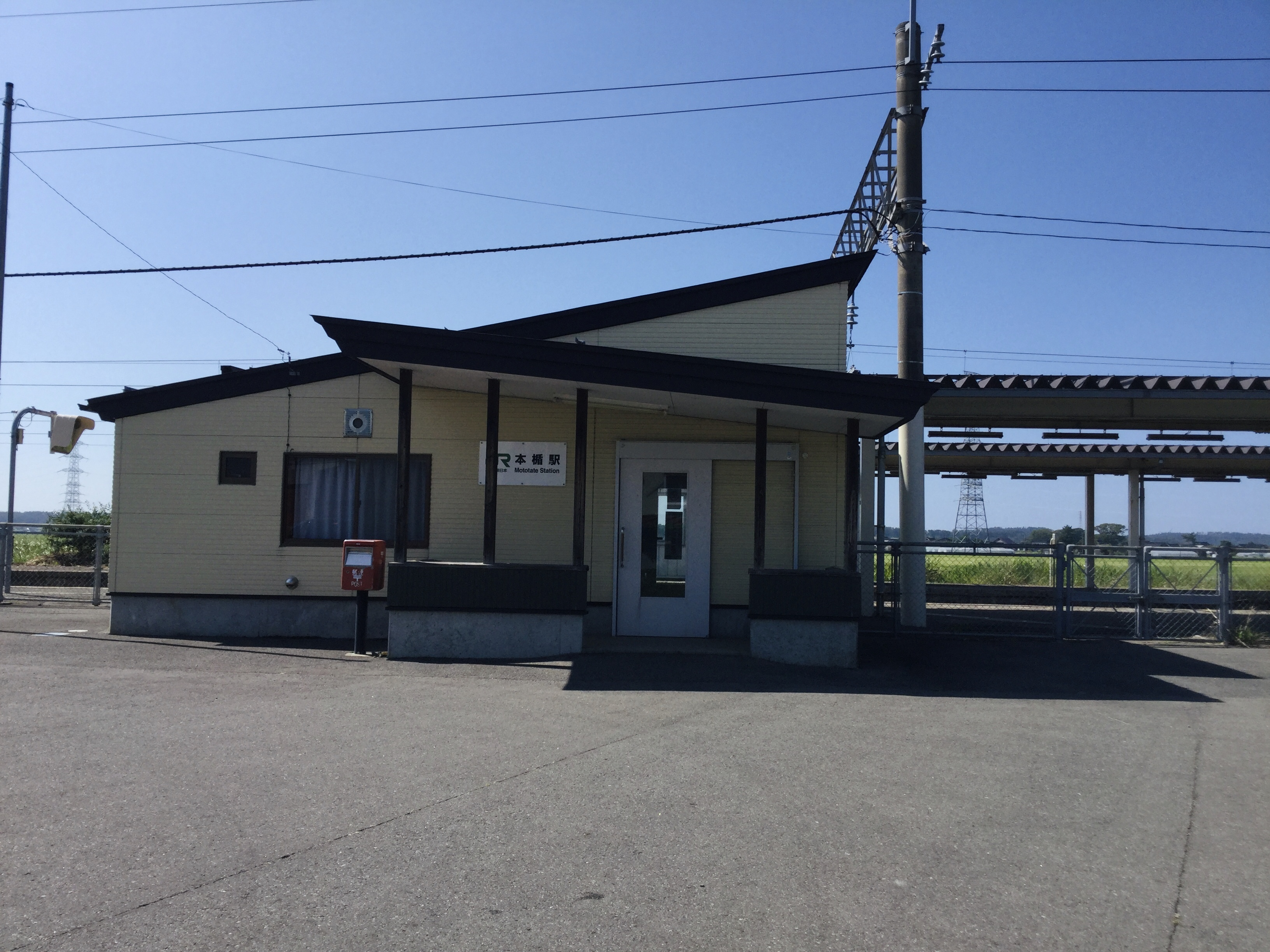 本楯駅駅舎